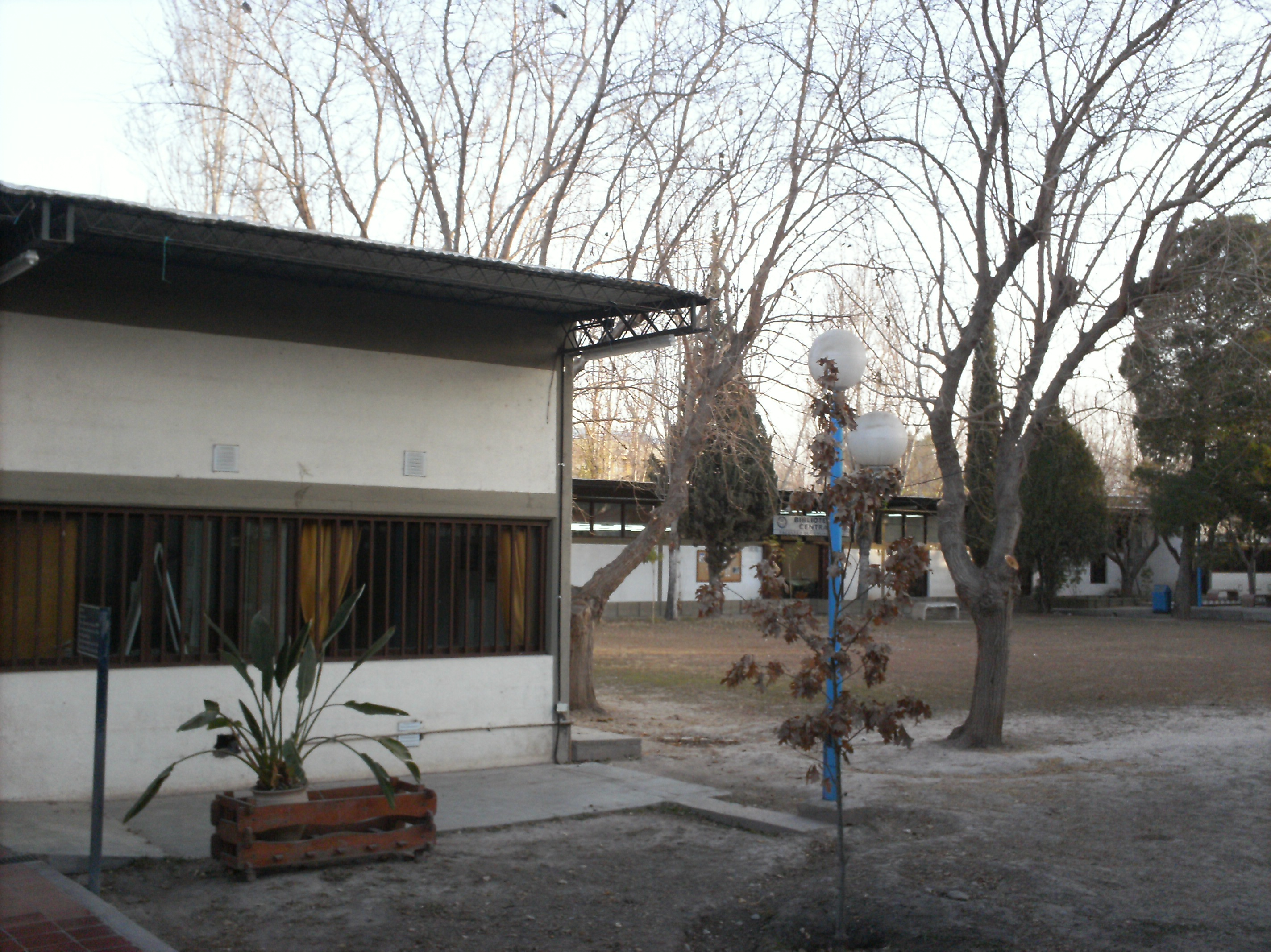 la facultad de cs ss arquitectura en el universitario complejo islas malvinas. nótese que sus auals estan al aire libre